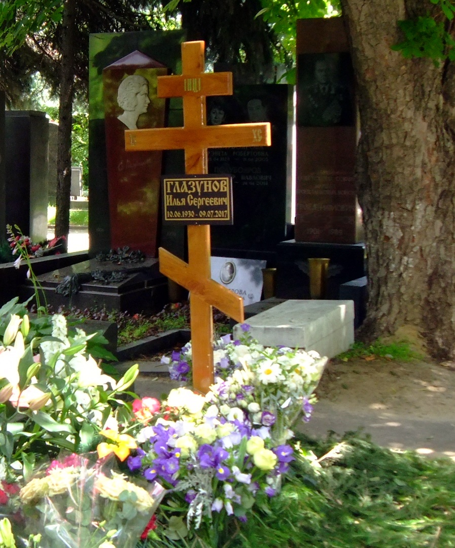 Крест на Новодевичьем на могиле Глазунова Ильи Сергеевича (июль 2017г).